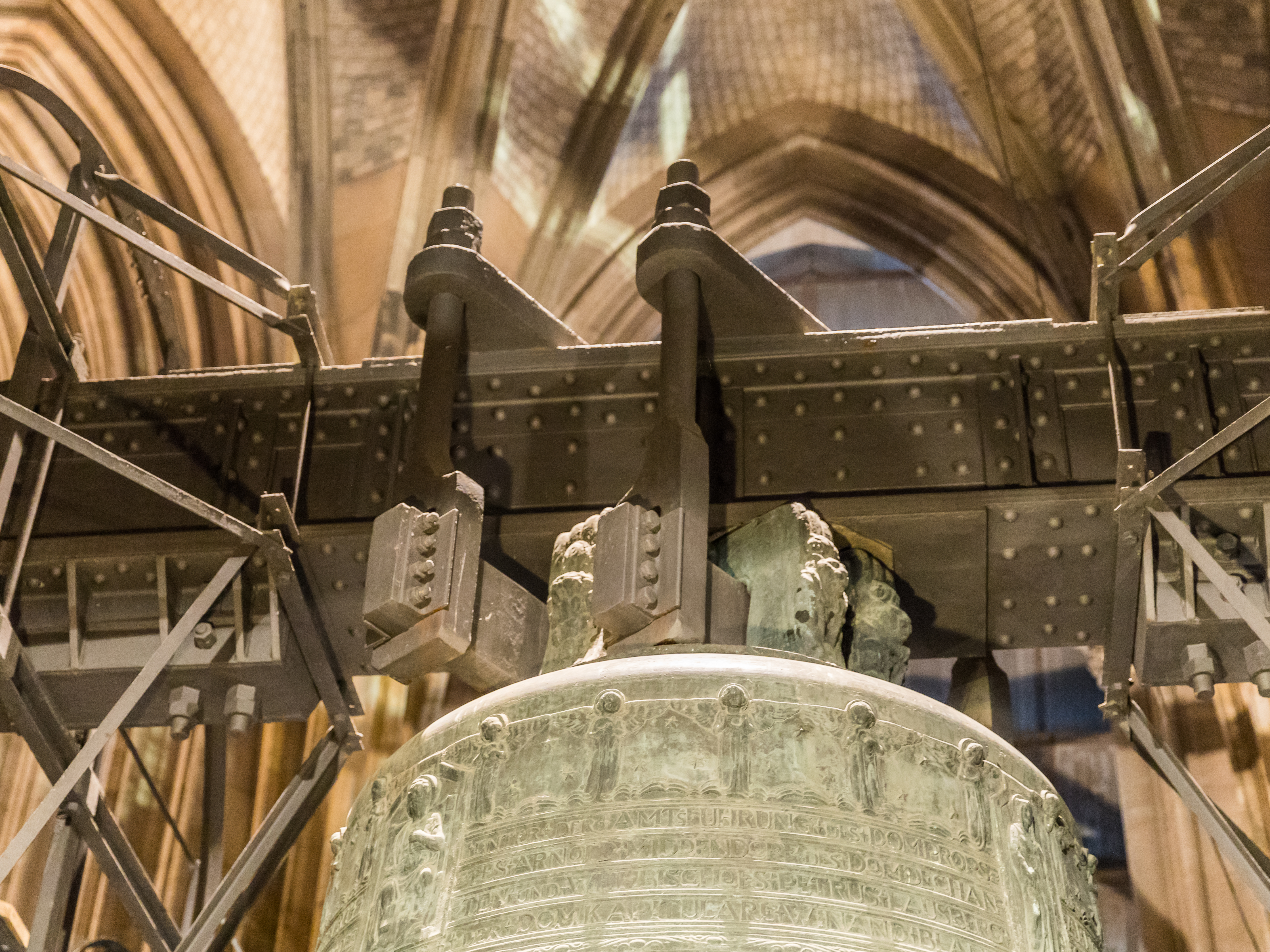 Pressetermin zum Probeläuten des Dicker Pitter (St. Petersglocke) im Kölner Dom nach Montage einer neuen Klöppelaufhängung. Foto: Die um 20° gedrehte Aufhängung